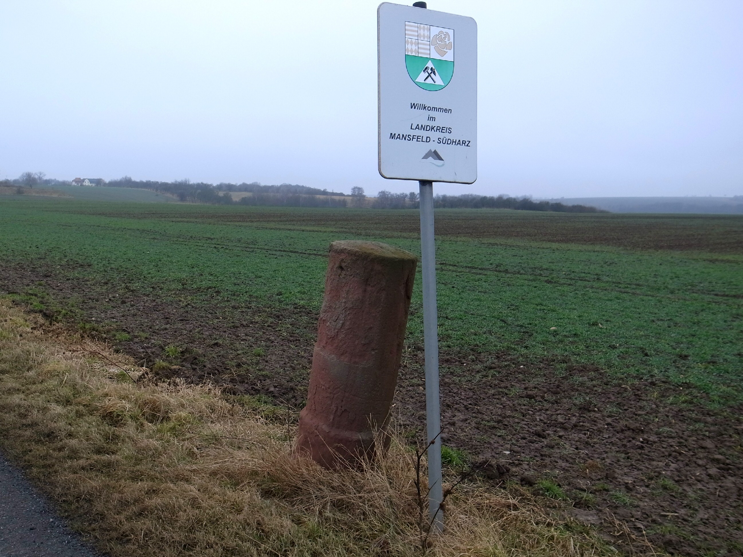 Sandersleben nähe Roda, Meilenstein, Anhaltischer Rundsockelstein